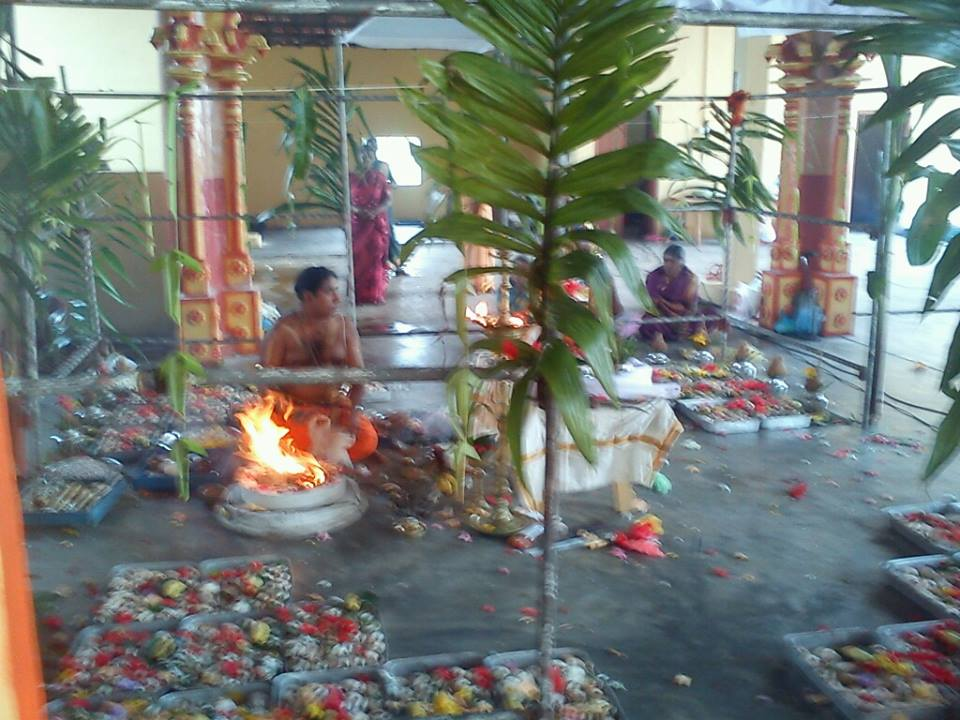 கும்பாபிசேகம்